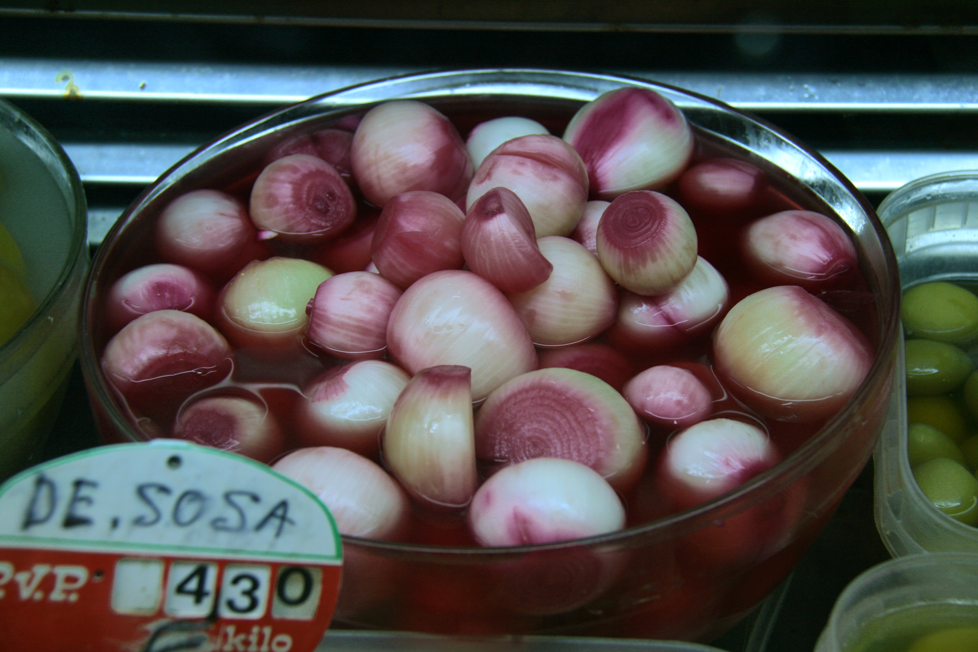 Cebollas rojas encurtidas